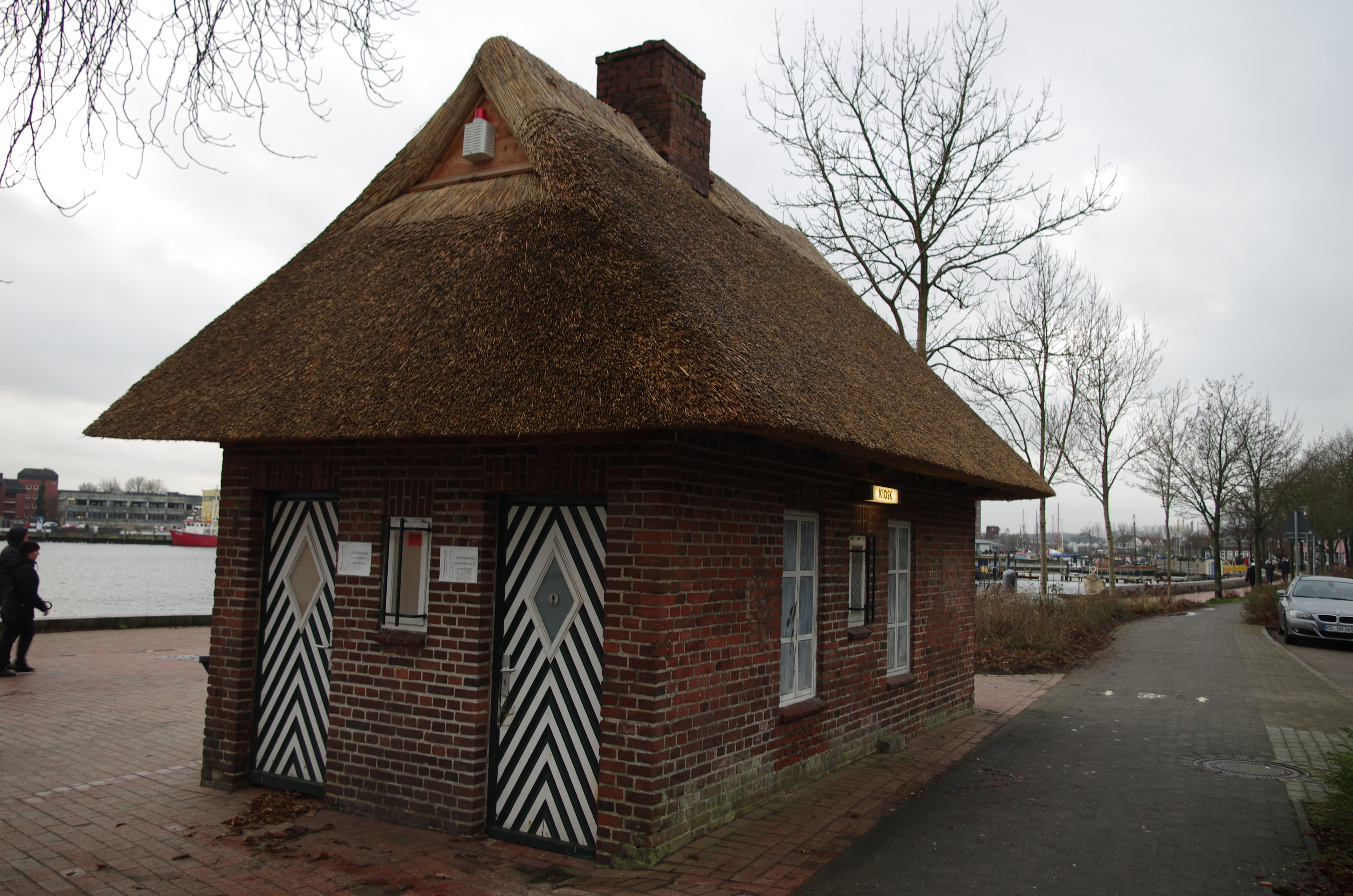 Eckernförde in Schleswig-Holstein. Der Kiosk in der Straße Vogelsang am Hafen steht unter Denkmalschutz.